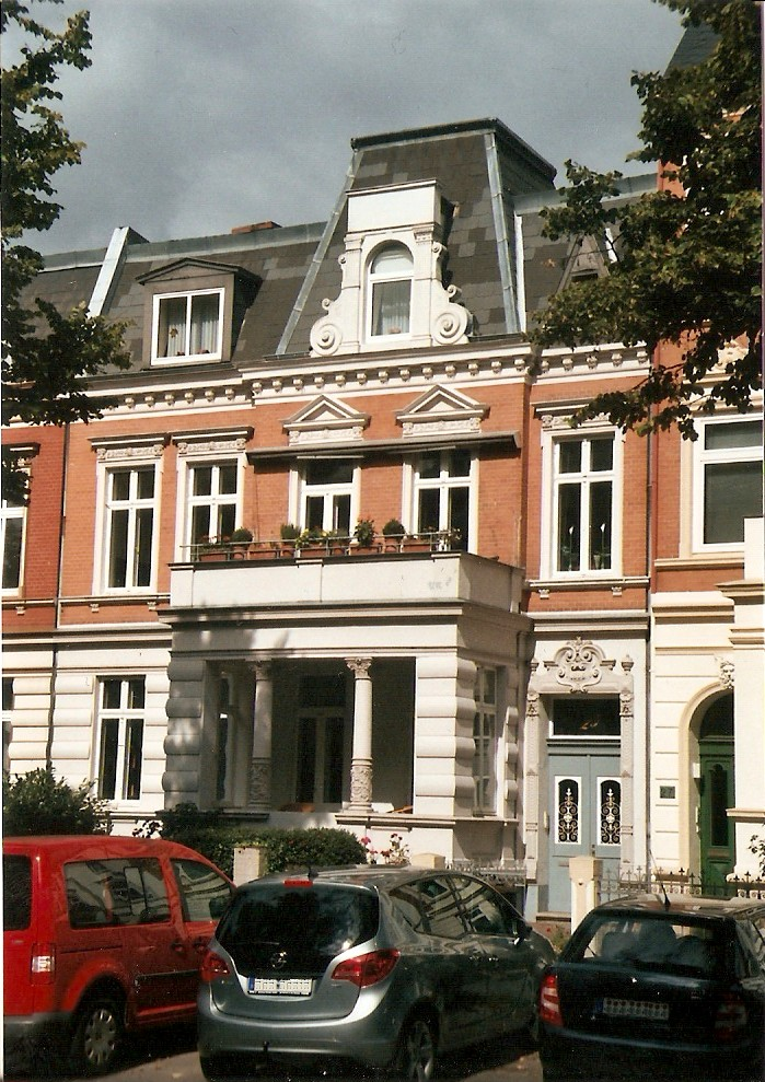 Erstsitz der 81. Infanterie-Brigade, Moltkestraße 25